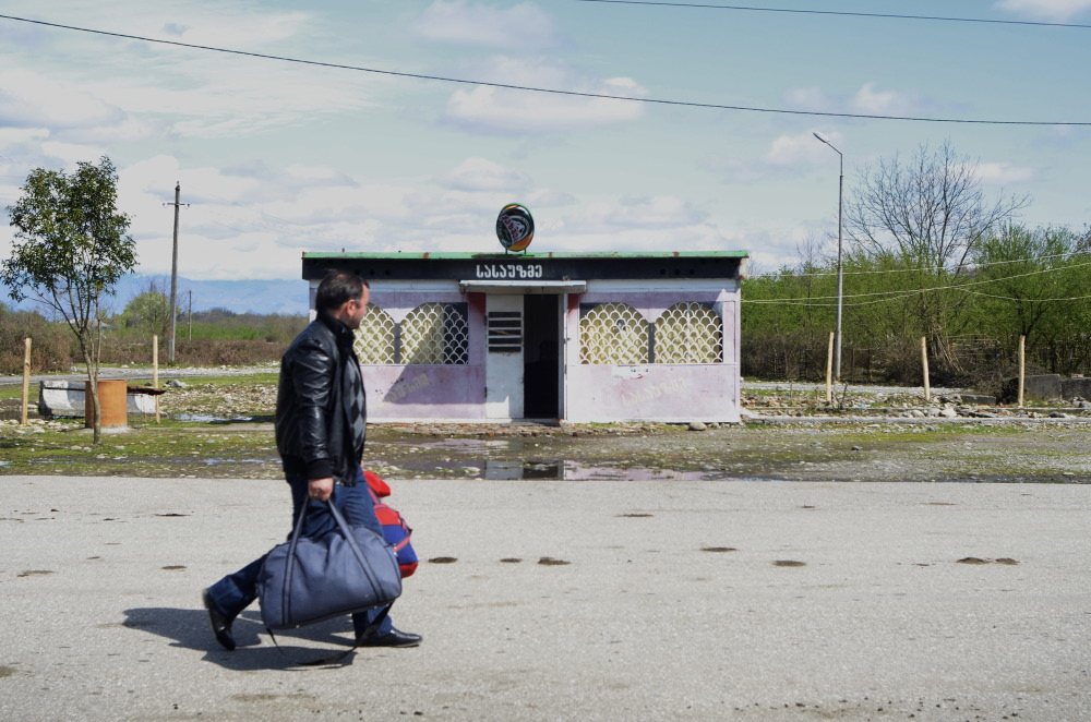 Point de passage piéton de la ligne de démarcation entre l'Abkhazie et la Géorgie.